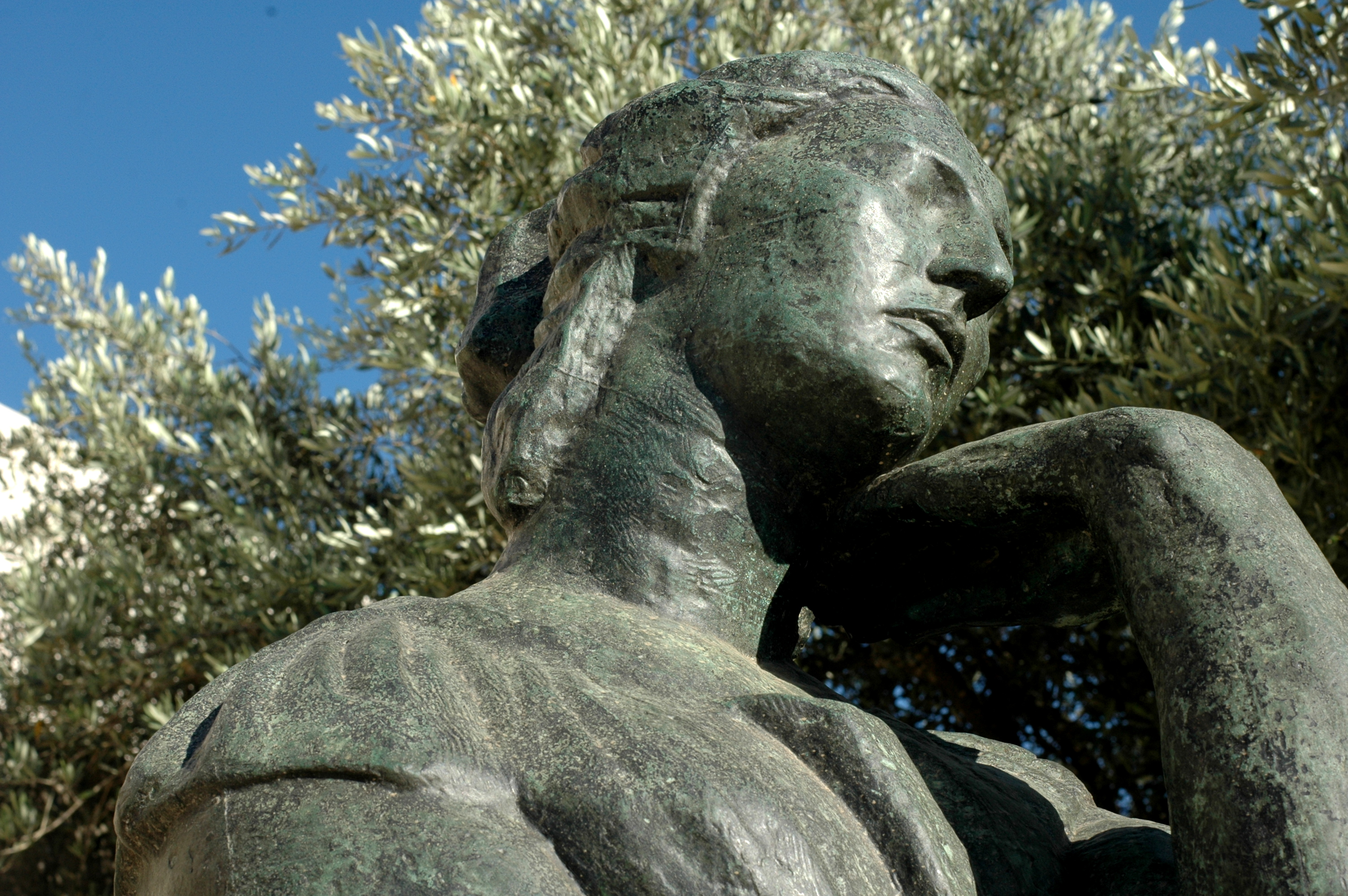 Sculpture